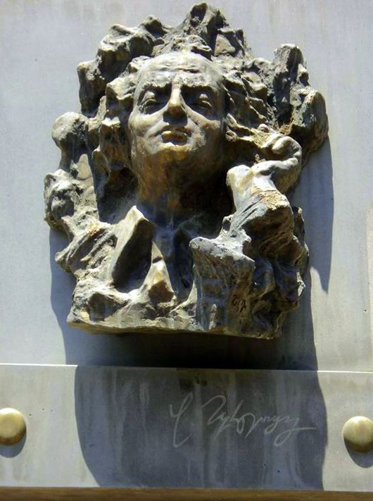 Քանդակագործ` Էդուարդ Շախիկյան